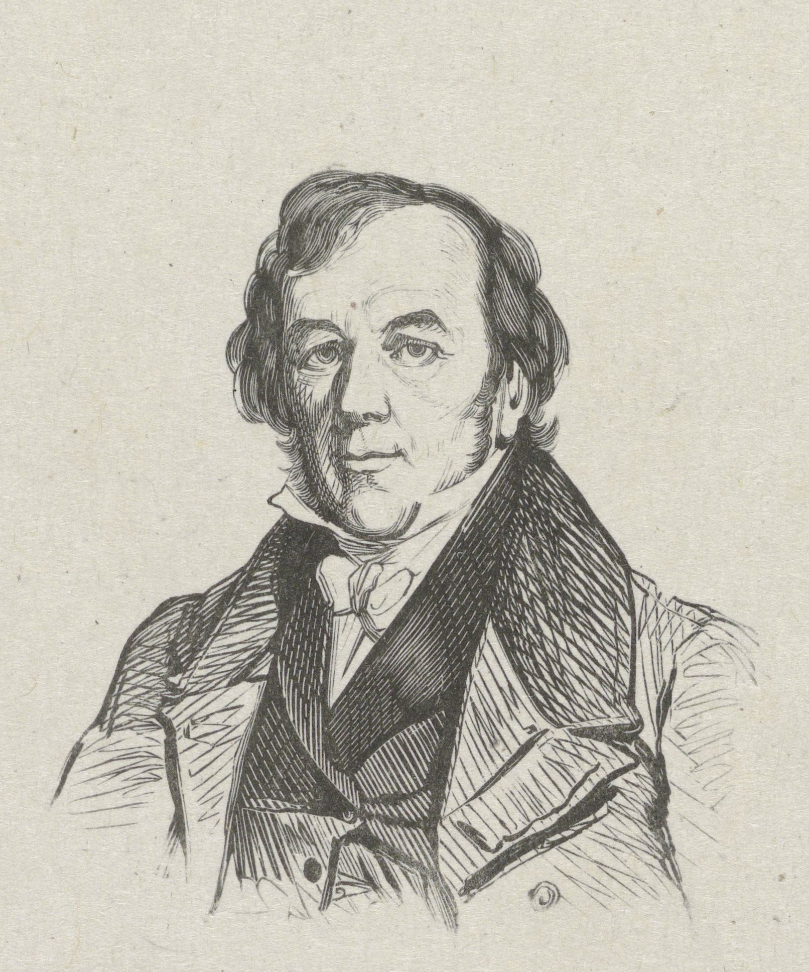 Portret van Louis Moritz (uitsnede)